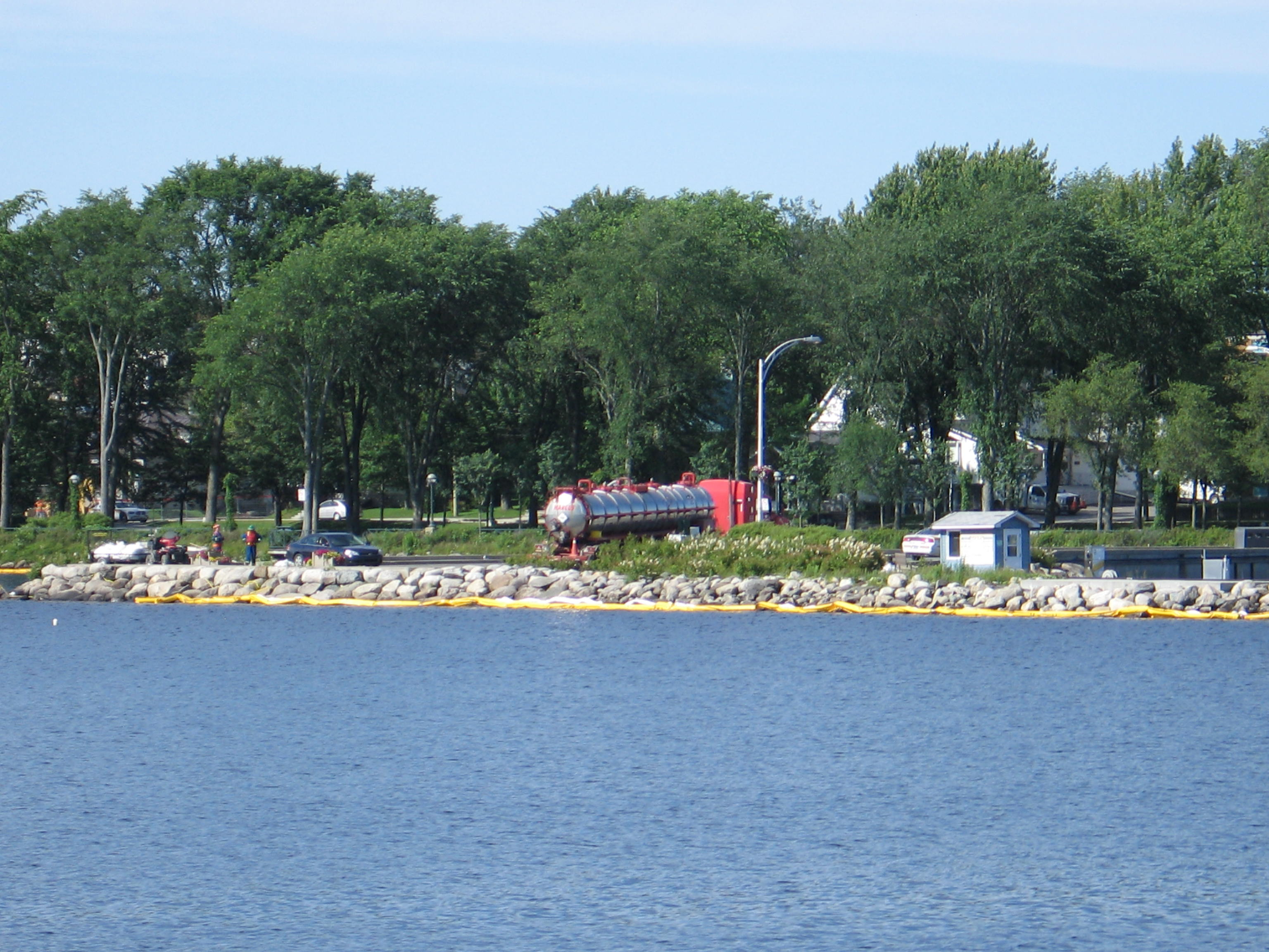 Des camions-citernes nettoient le pétrole contenu par des estacades sur la rive du lac Mégantic, une semaine après l'accodent ferroviaire de Lac-Mégantic.